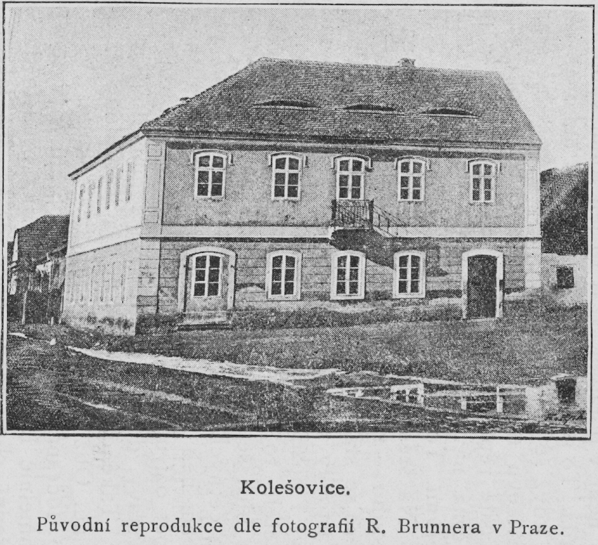 School in Kolešovice (Bohemia), operated by Ústřední matice školská. Cropped from File:Skoly UMS Bruner-Dvorak.png